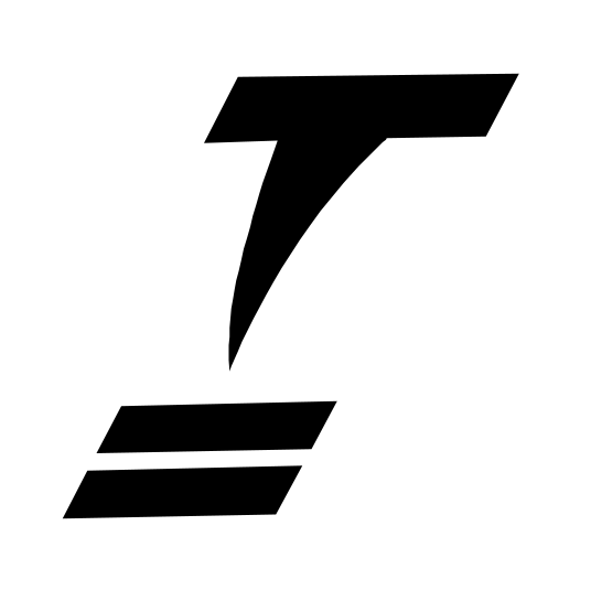 Klassenzeichen Tornado (Bootsklasse), selbst gezeichnet *uploaded by --Tout (Diskussion) 21:57, 15 September 2006 (UTC)